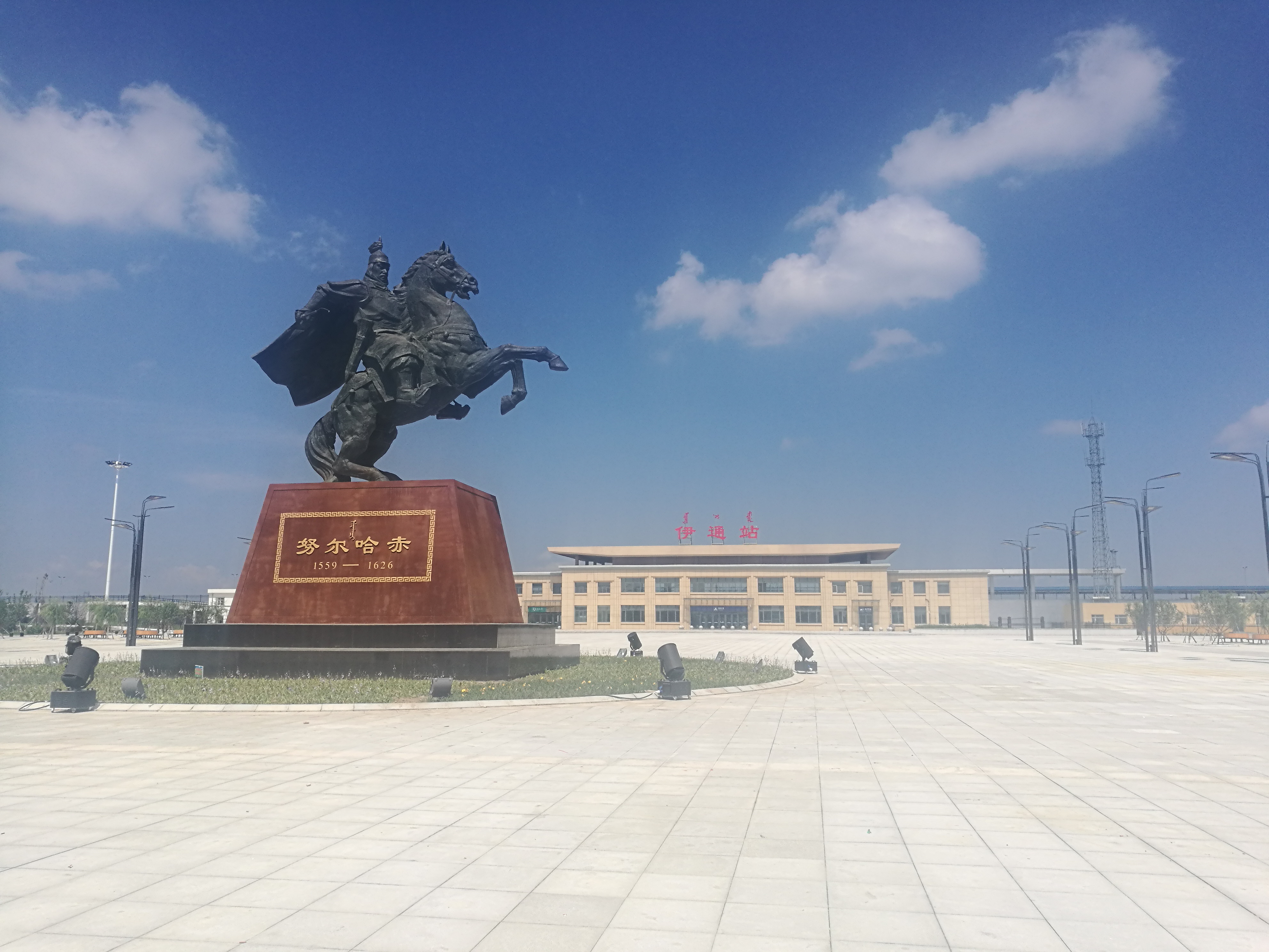 伊通火车站